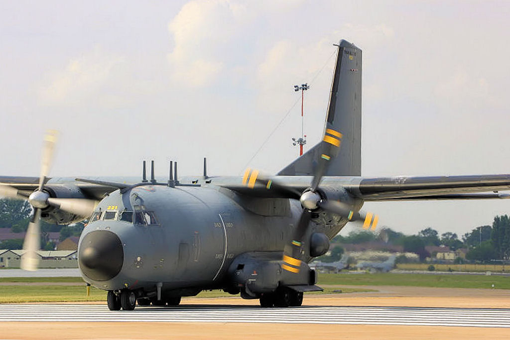 C160 Gabriel - RIAT 2005